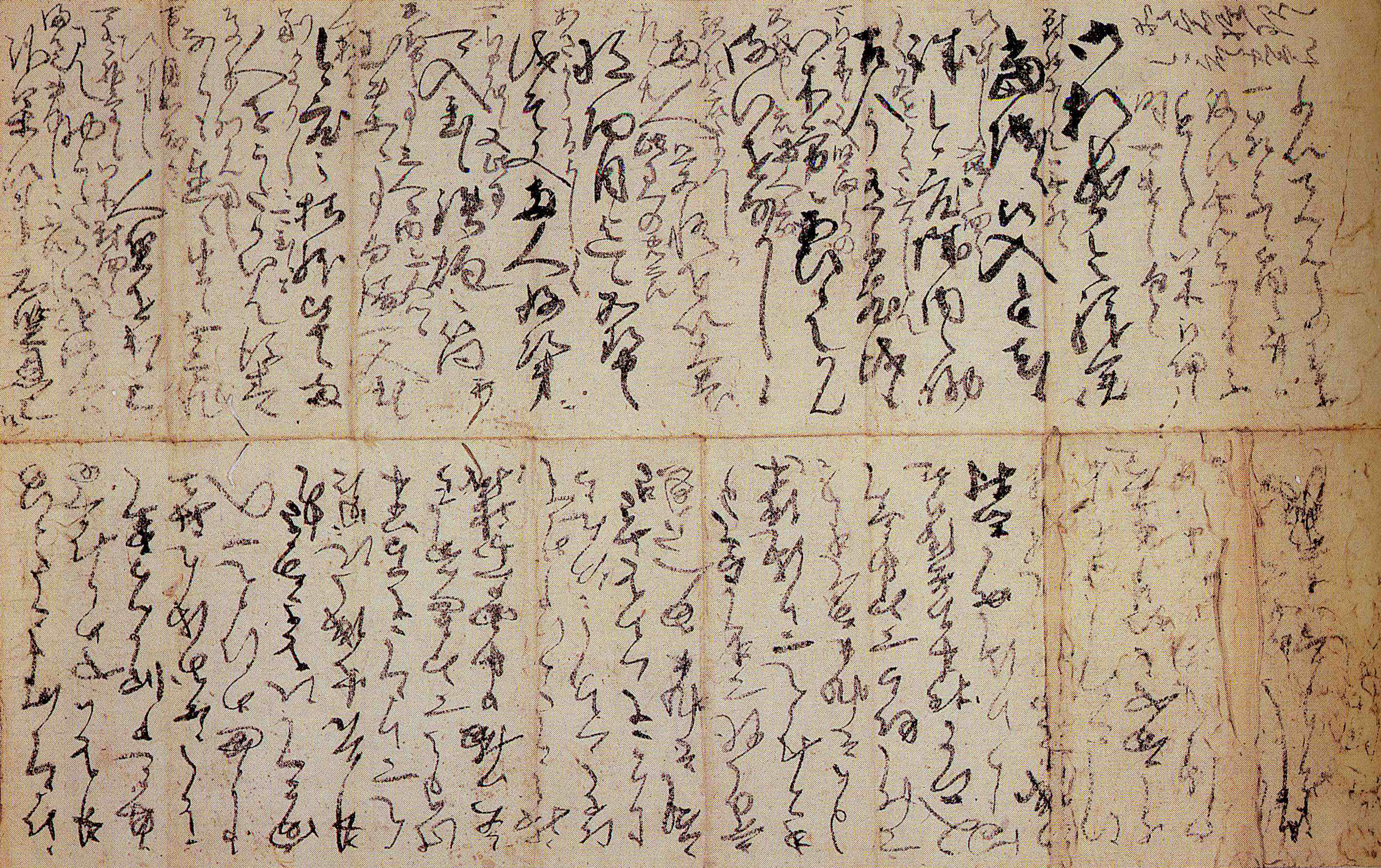 明智光秀書状 個人蔵 大津市指定文化財 元亀2年（1571年）9月2日付けの明智光秀の直筆の書状で、比叡山焼討ち直前で地元の国人の一人、和田秀純に充てた書状である。内容は明智光秀はこの国人に対して懐柔工作を実施し、織田信長軍の湖東の進路などが詳しく記載されている。